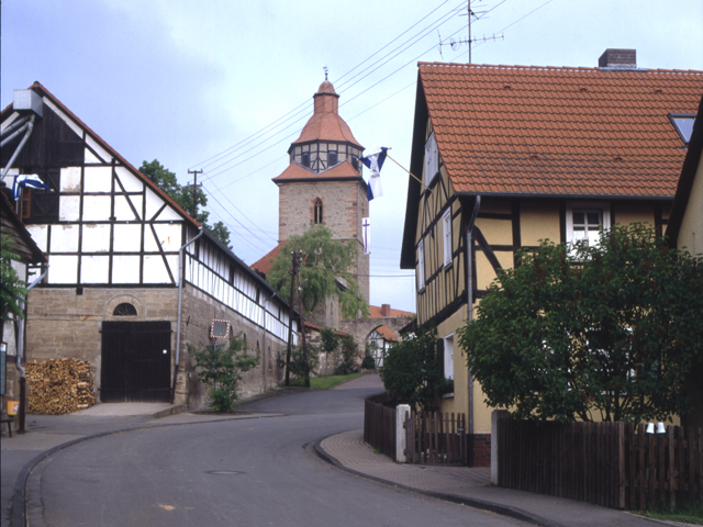 Röhrda/Ringgau im Nordhessischen, Straße „Vor dem Kirchtor" mit Fachwerkhäusern und Blick auf die Wehrkirche, 1989. AGFAChrome 50RS, Rollei SL66e